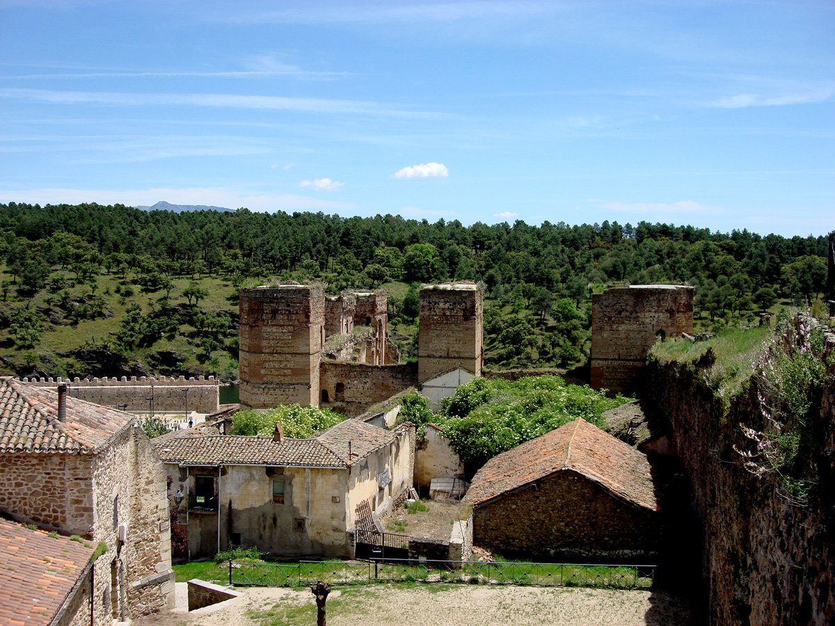 El castillo se alza sobre la esquina sureste de la muralla que rodea el casco histórico de Buitrago de Lozoya, a la que ocupa parcialmente. Sus materiales de construcción (ladrillo, cal y piedra) dan cuenta de su influencia musulmana, así como la disposición de los ladrillos, colocados en bandas horizontales unidas por cal y enmarcadas por bloques de piedra maciza.